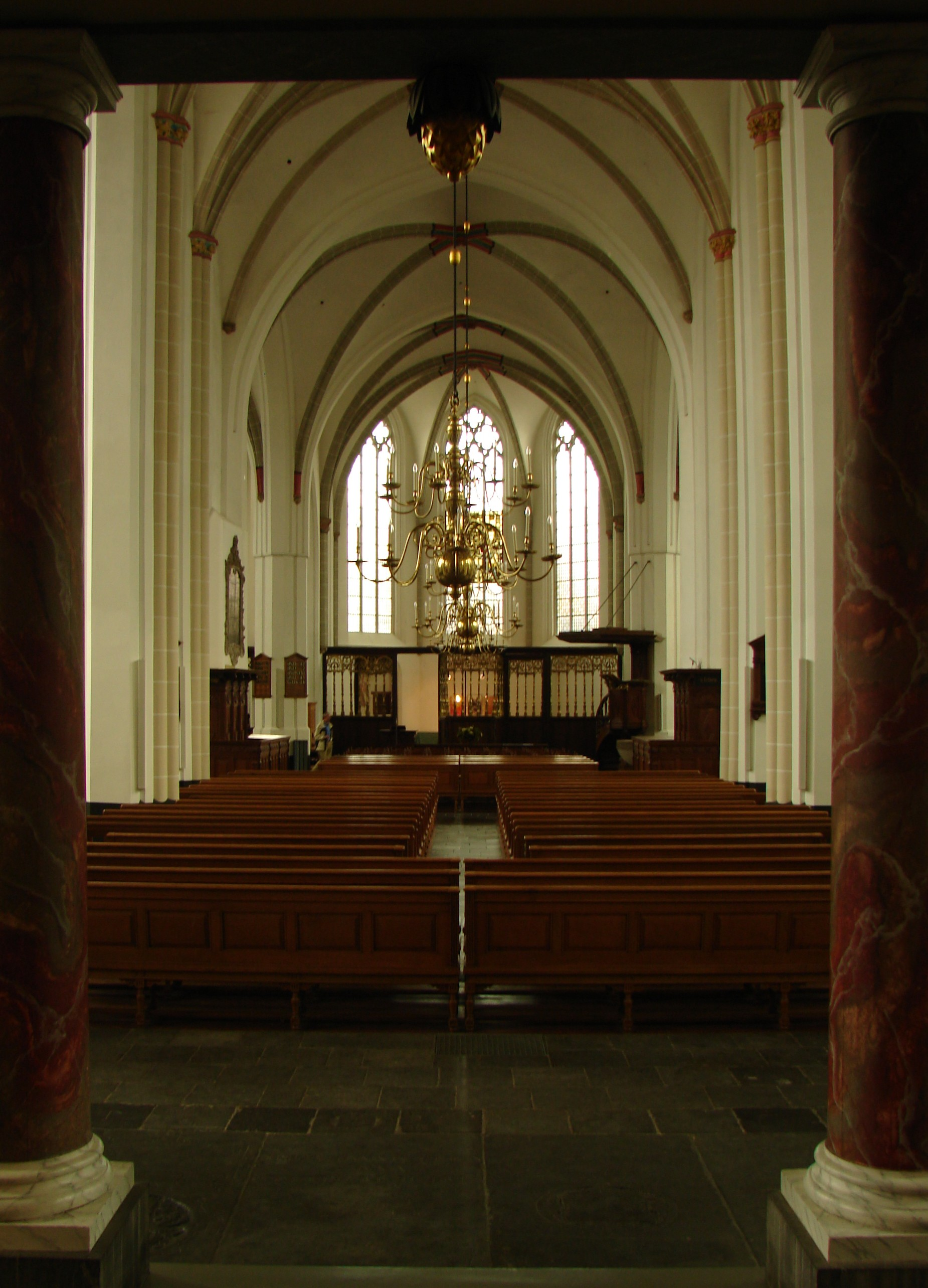 Interieur van de Jacobikerk te Utrecht